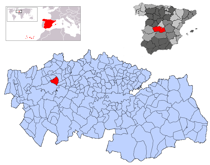 Pepino en la provincia de Toledo